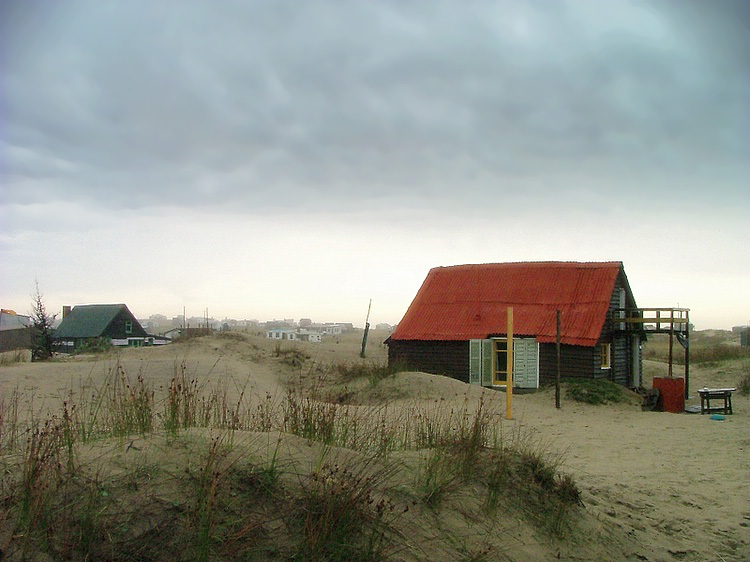 "Ranchos del Cabo" in Cabo Polonio, Rocha, UruguayLos ranchos del cabo